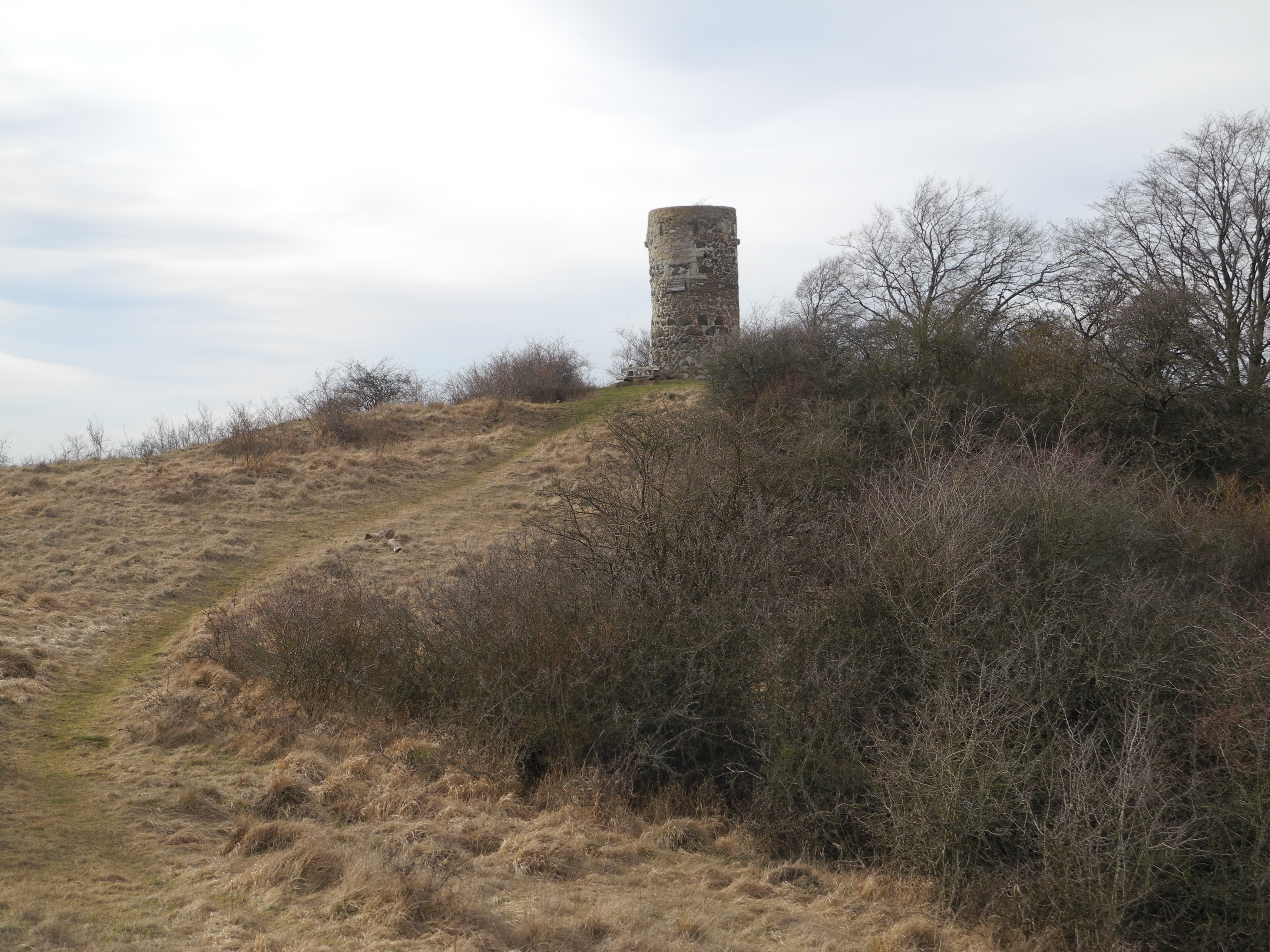 Flächenhaftes Naturdenkmal im Landkreis Kassel 6.33.916. „Basaltkuppe Die Warte“ nordwestlich von Zierenberg.